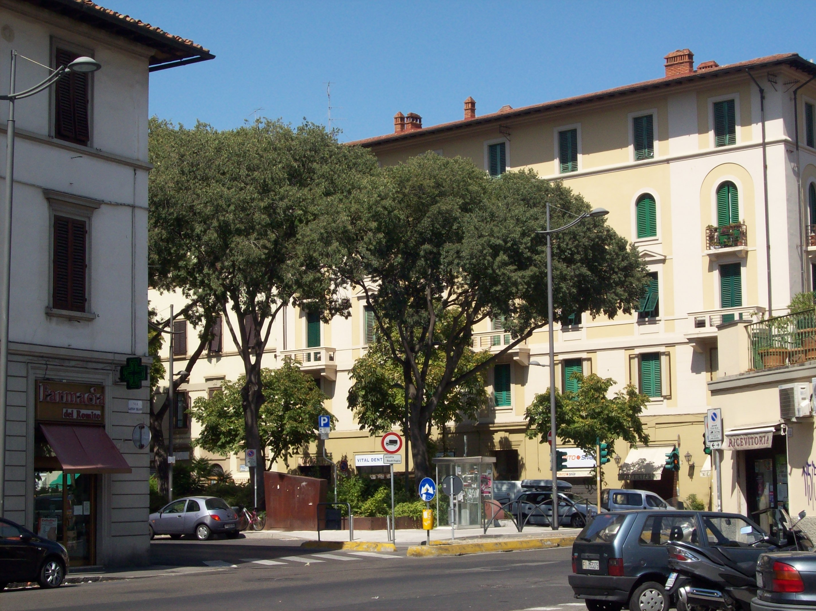 La Piazza Vista da Via Enrico Mayer